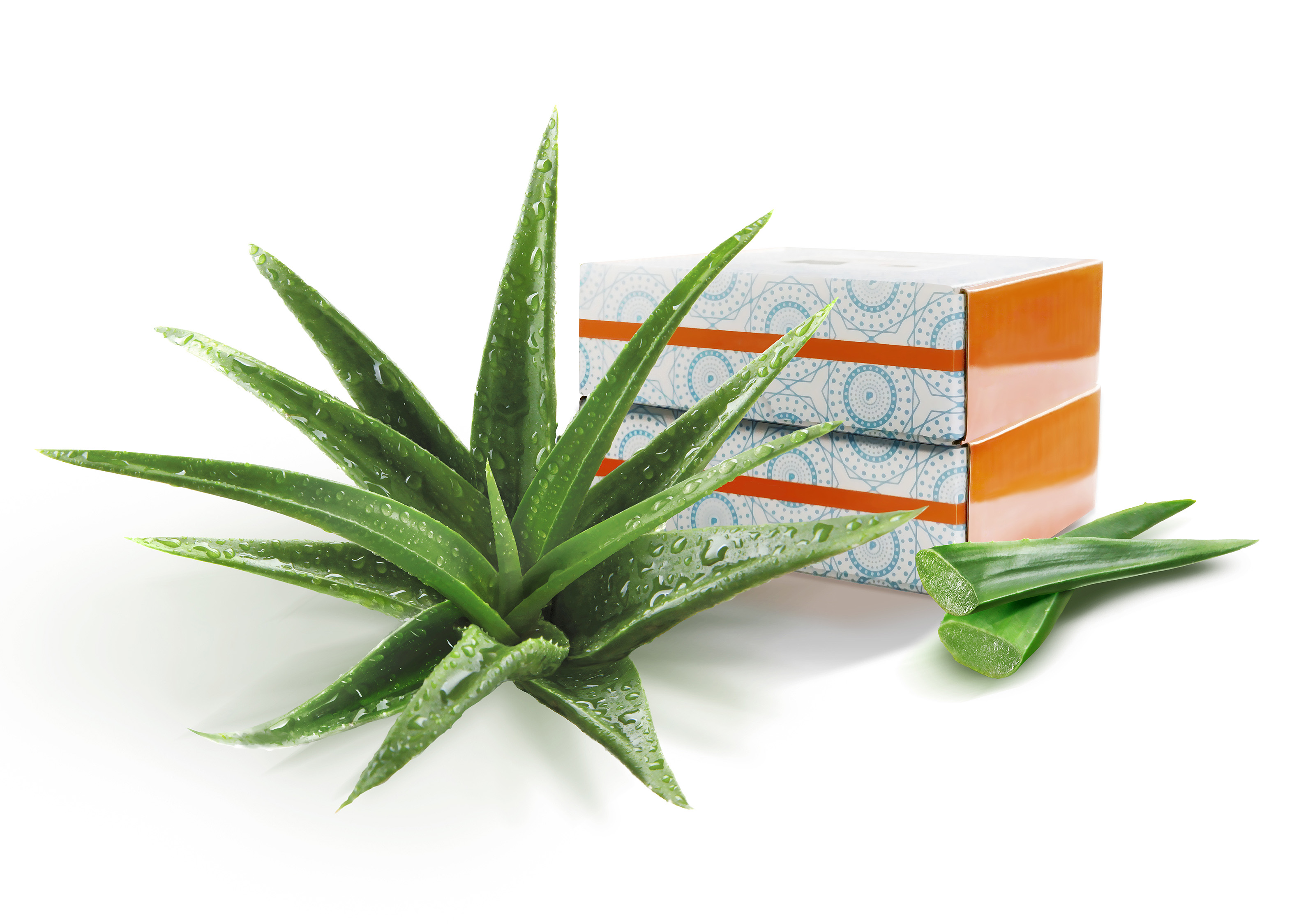 Aloe-kuitu on aloe vera -kasvista valmistettu viskoosikuitu. Sen parhaimpiin ominaisuuksiin kuuluu hyvä kosteudenimukyky, minkä ansiosta aloe-kuidusta valmistetut tuotteet ovat miellyttävän tuntuisia, hengittäviä, eivätkä ne sähköisty.